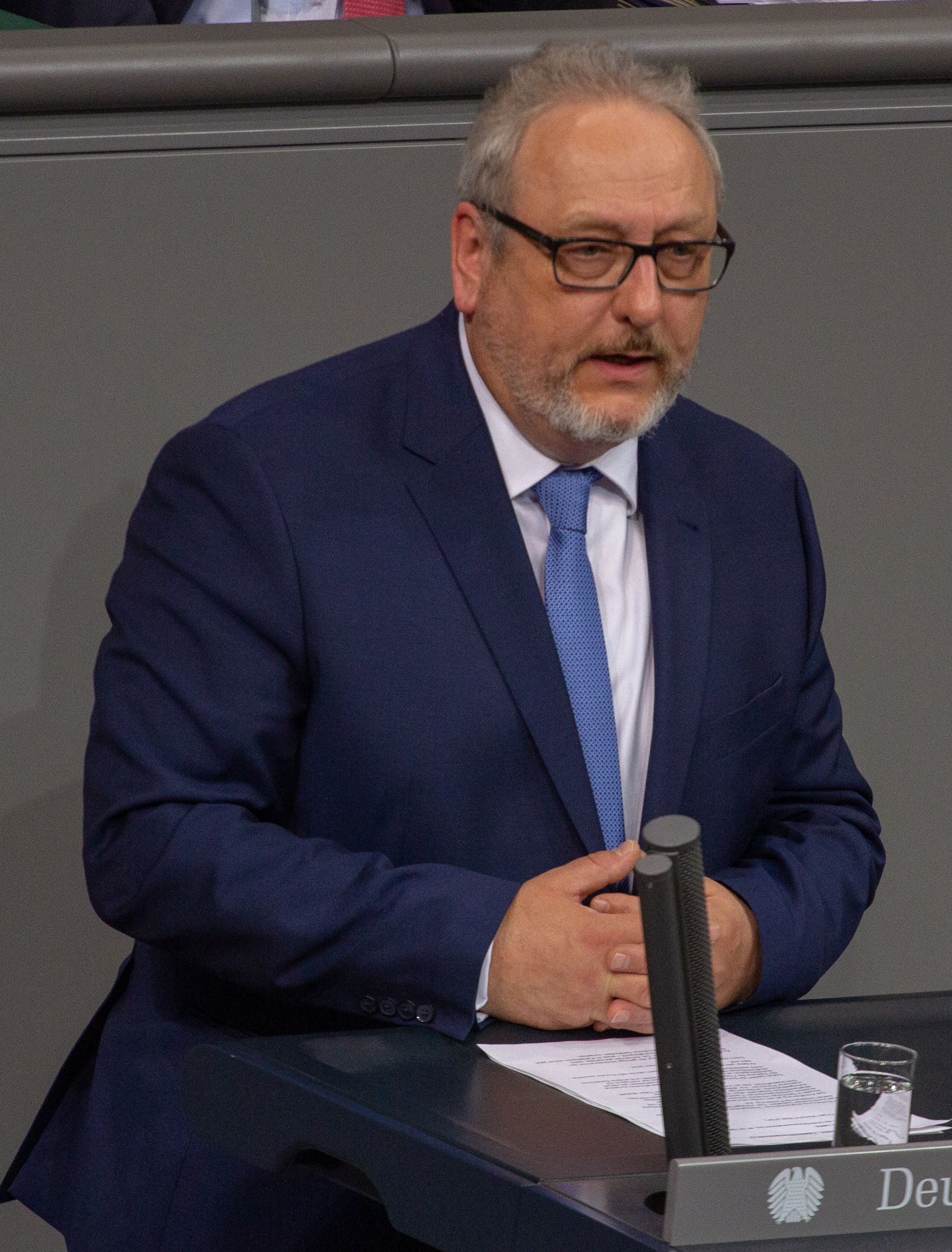 Jürgen Martens, Mitglied des Deutschen Bundestages, während einer Plenarsitzung am 11. April 2019 in Berlin.